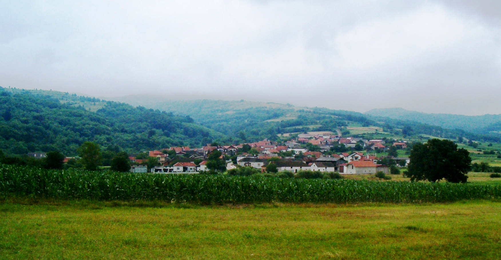 Снеготин